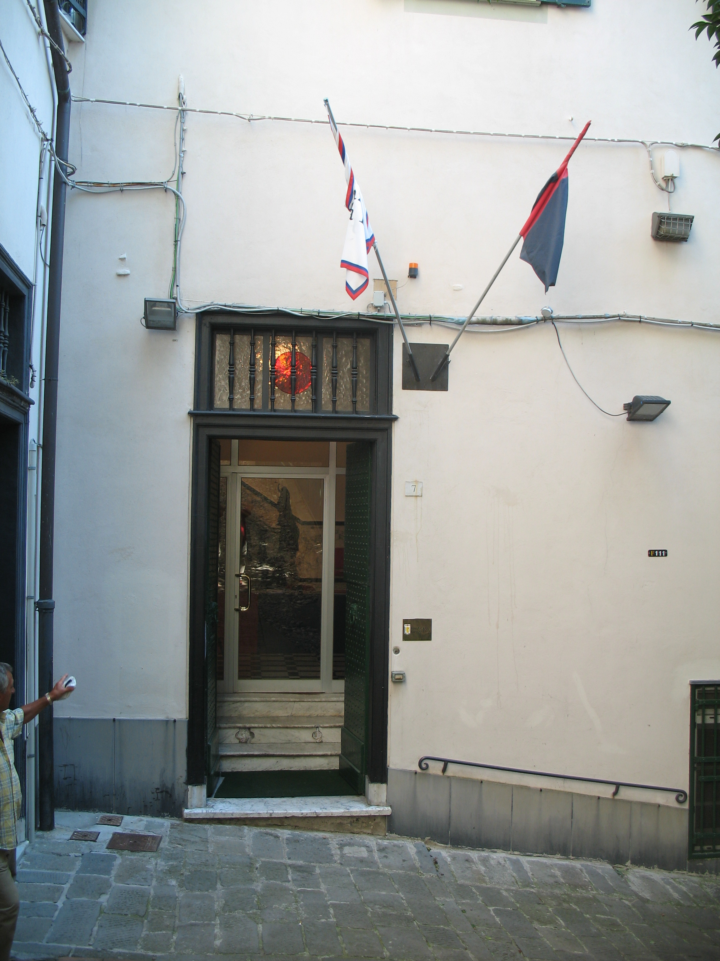 Museo della Storia del Genoa, Genova, Italia.